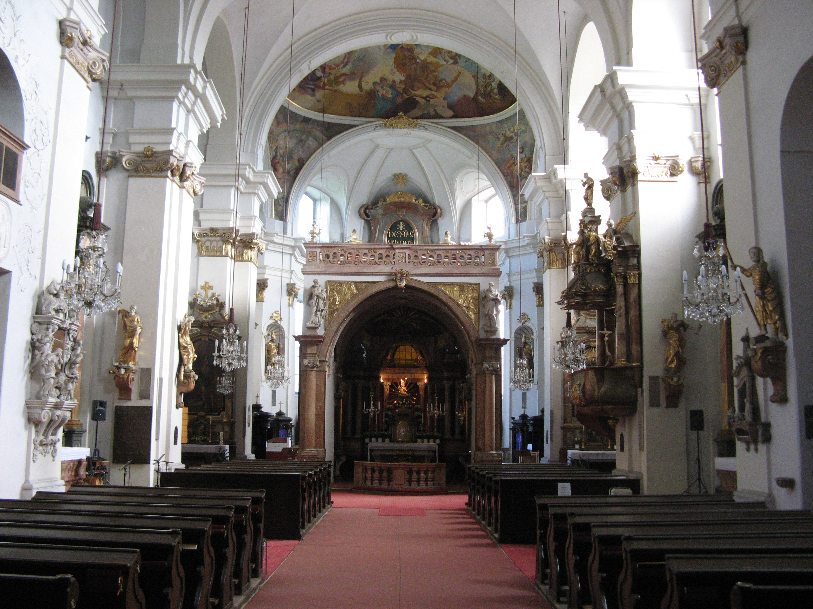 Wallfahrtskirche Maria Lanzendorf, Niederösterreich